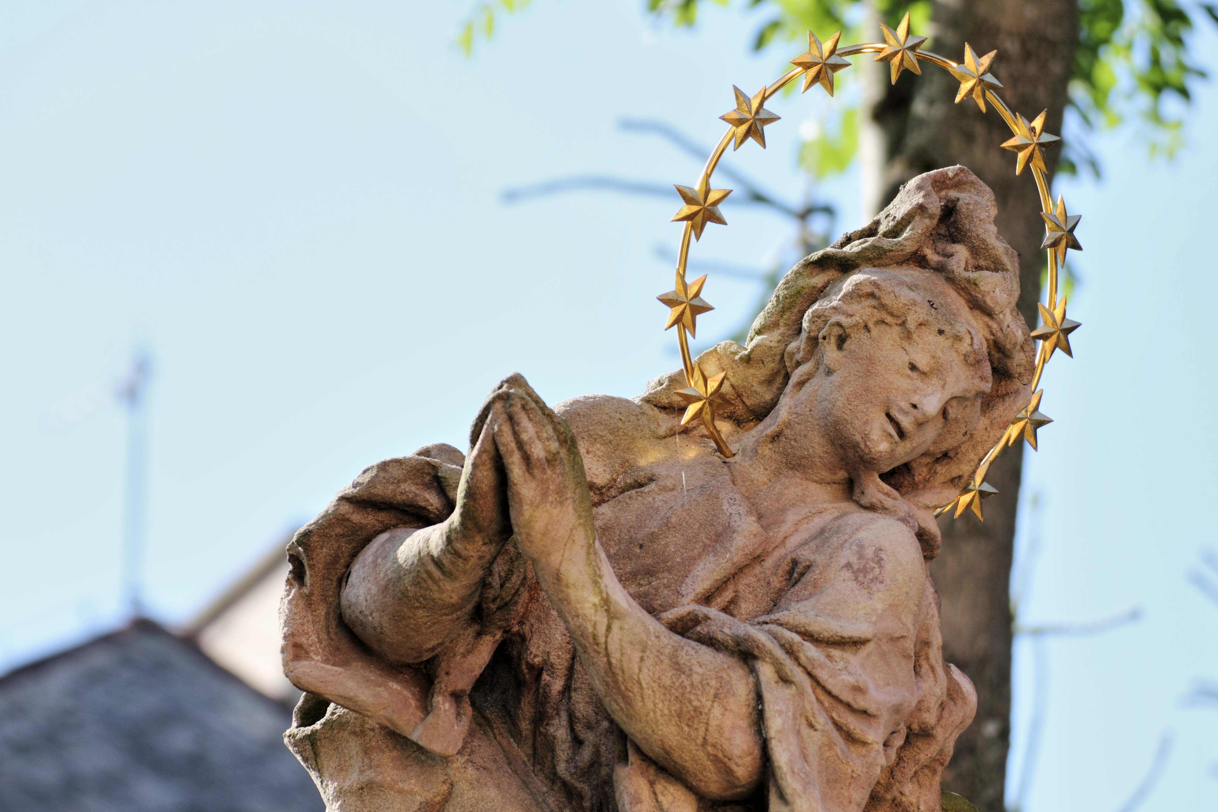 Socha P. Marie (Jilemnice), přemístěna do zám. parku, Jilemnice